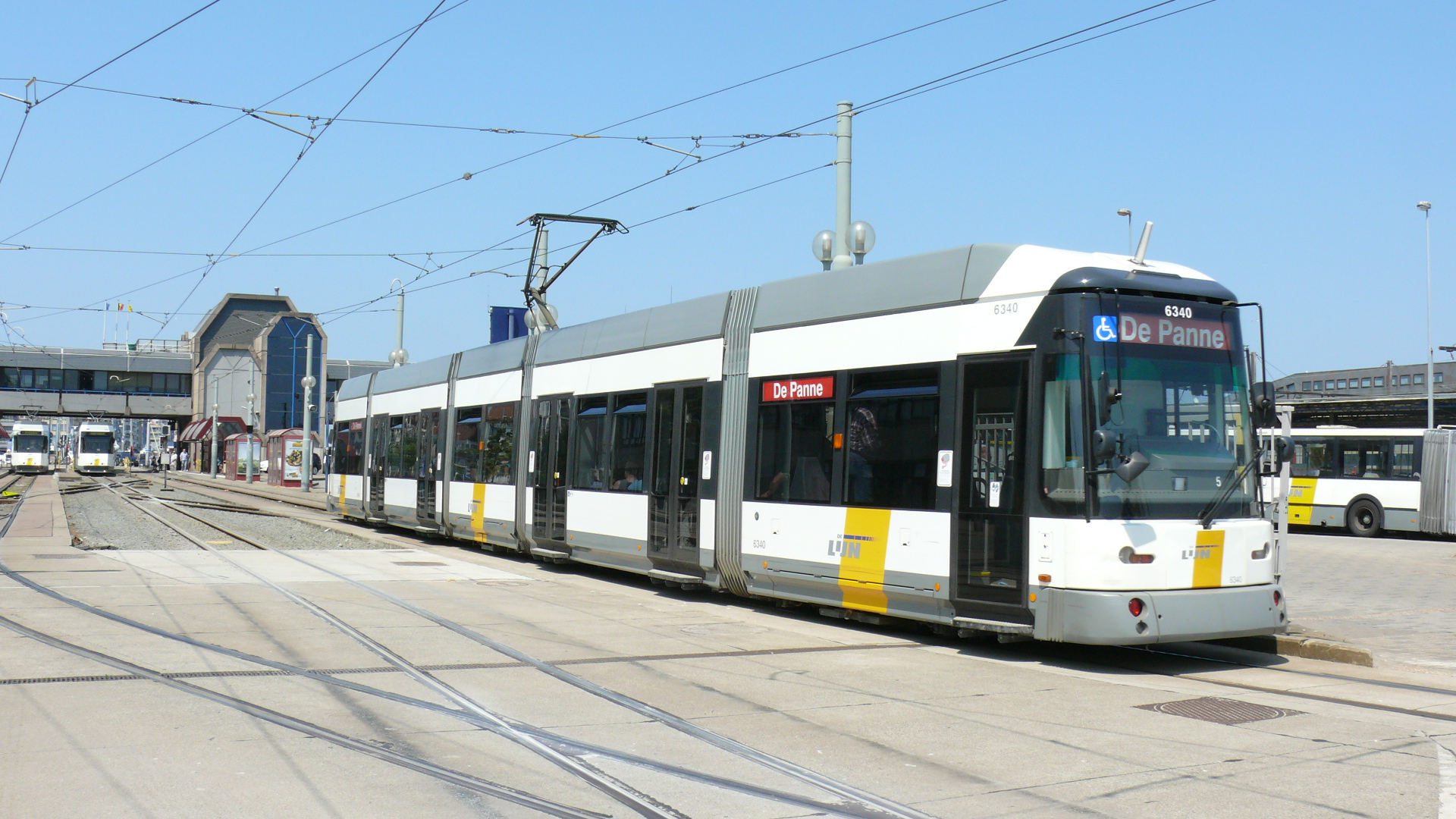 Rame "Hermelijn" N° 6340 à "Oostend Station" en provenance de Knokke Station